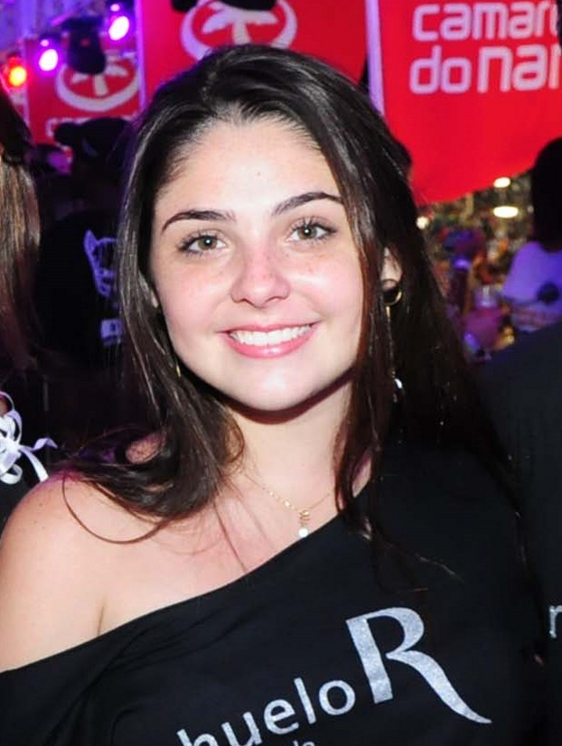 Português do Brasil: Atriz brasileira Marcela BarrozoPortuguês do Brasil: Brazilian actress Marcela Barrozo